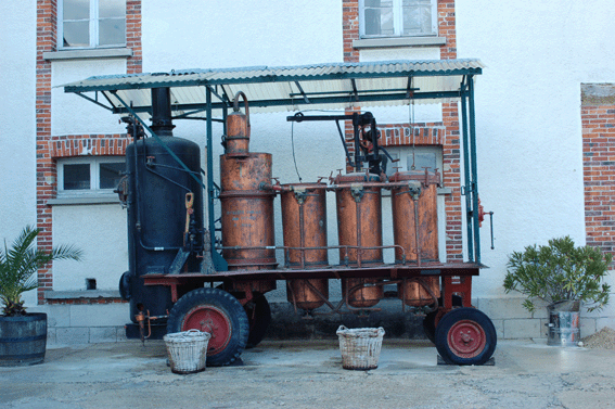 Alambic = machine à distiller